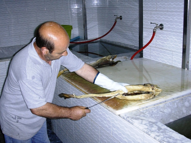 Autorizzazione OTRS # 2008022710009155 Lavorazione artigianale stocco di Mammola